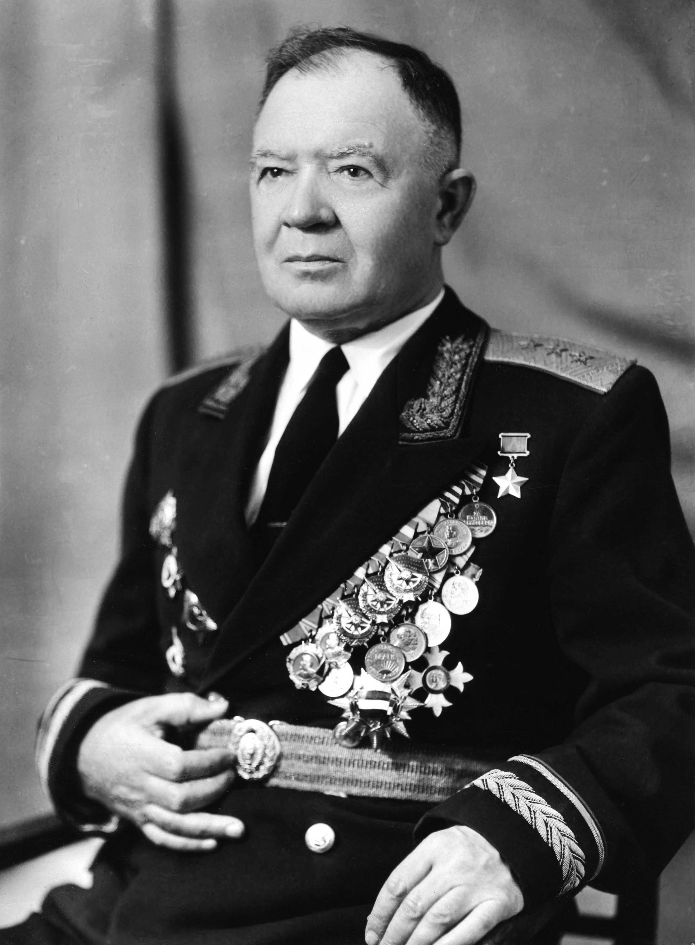 Портрет генерал-полковника Шафранова, Петра Григорьевича